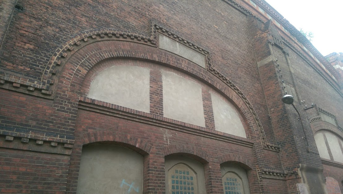 Erfurt Bw P 6